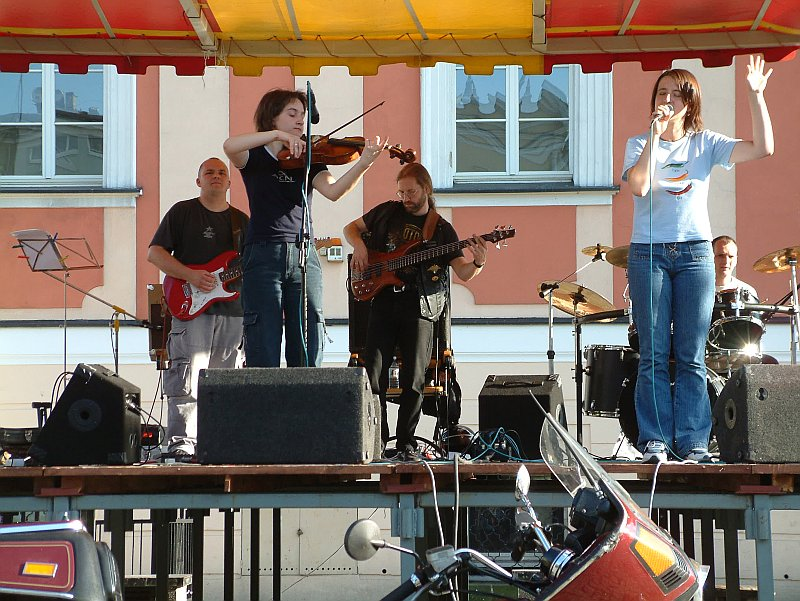 Przykłąd koncertu ewangelizacyjnego. Zdjęcie zespołu DCN - Dla Ciebie Niebo. Autor: Wikipedysta:PawelLorenc.